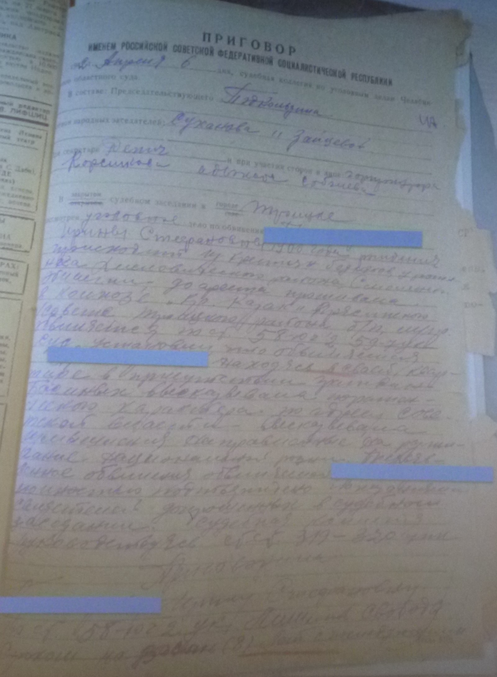 Приговор Челябинского областного суда от 6 апреля 1942 года о возбуждении межнациональной розни и контрреволюционной пропаганды